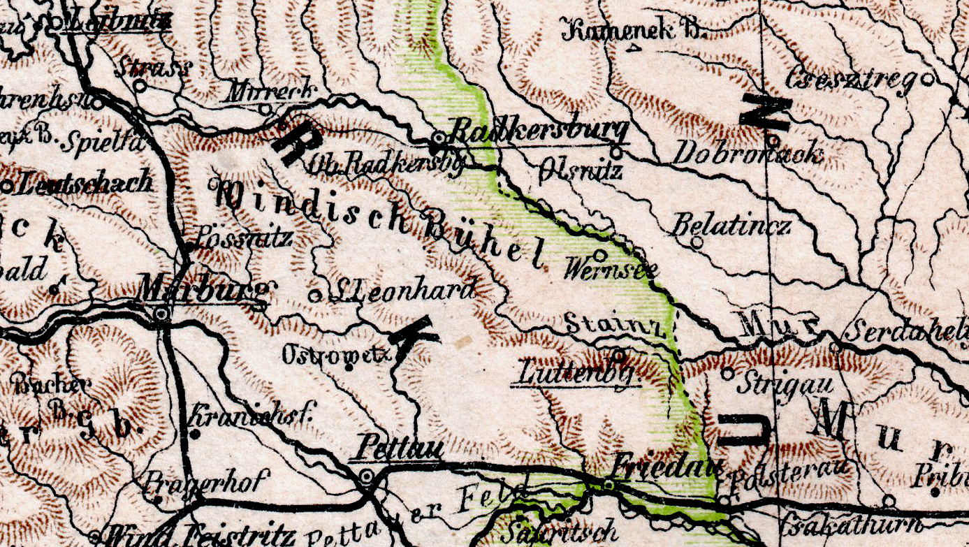 Windische Bühel (Slovenske Gorice), Tal des Flusses Stainz (Scavnica) bei Luttenberg (Ljutomer) in der Untersteiermark, Slowenien